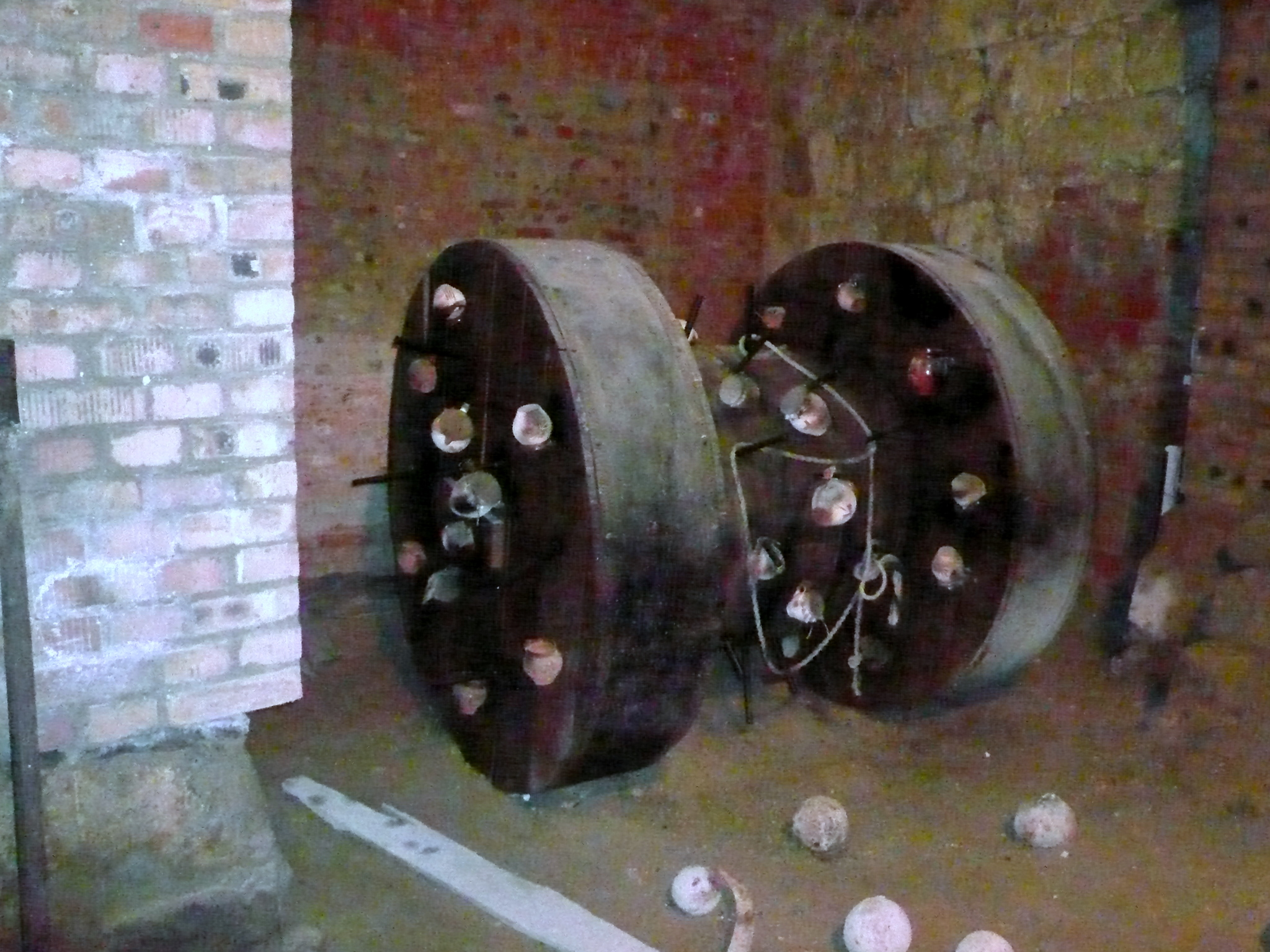 Eger. A "Tűzkerék" rekonstrukciója